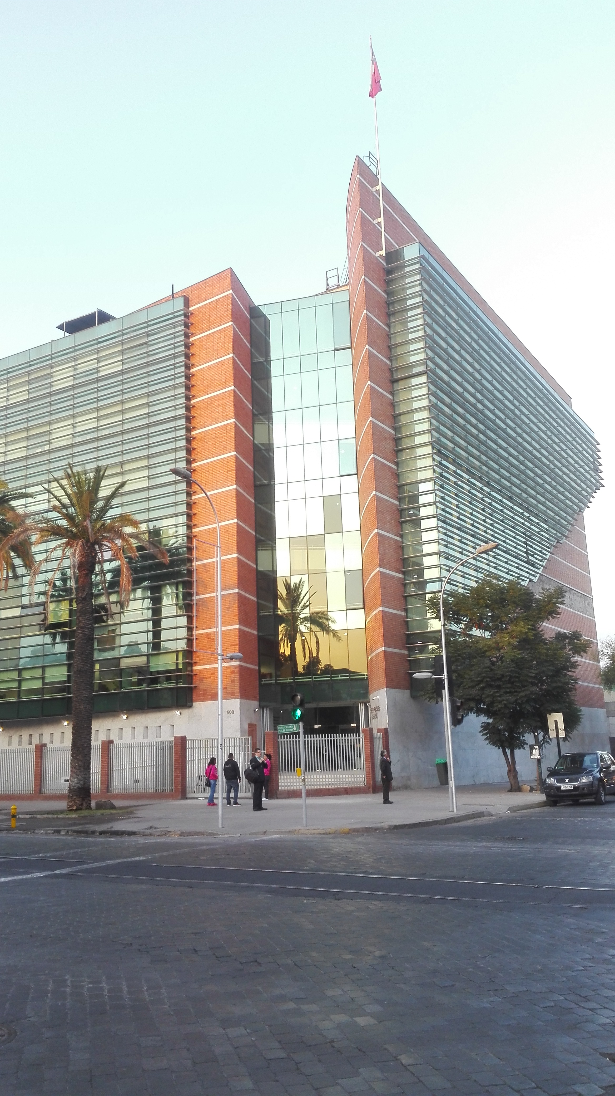 Edificio del Poder Judicial de Chile en la Av. España, Santiago. Desde febrero de 2016 funciona temporalmente en este edificio la Corte de Apelaciones de San Miguel.